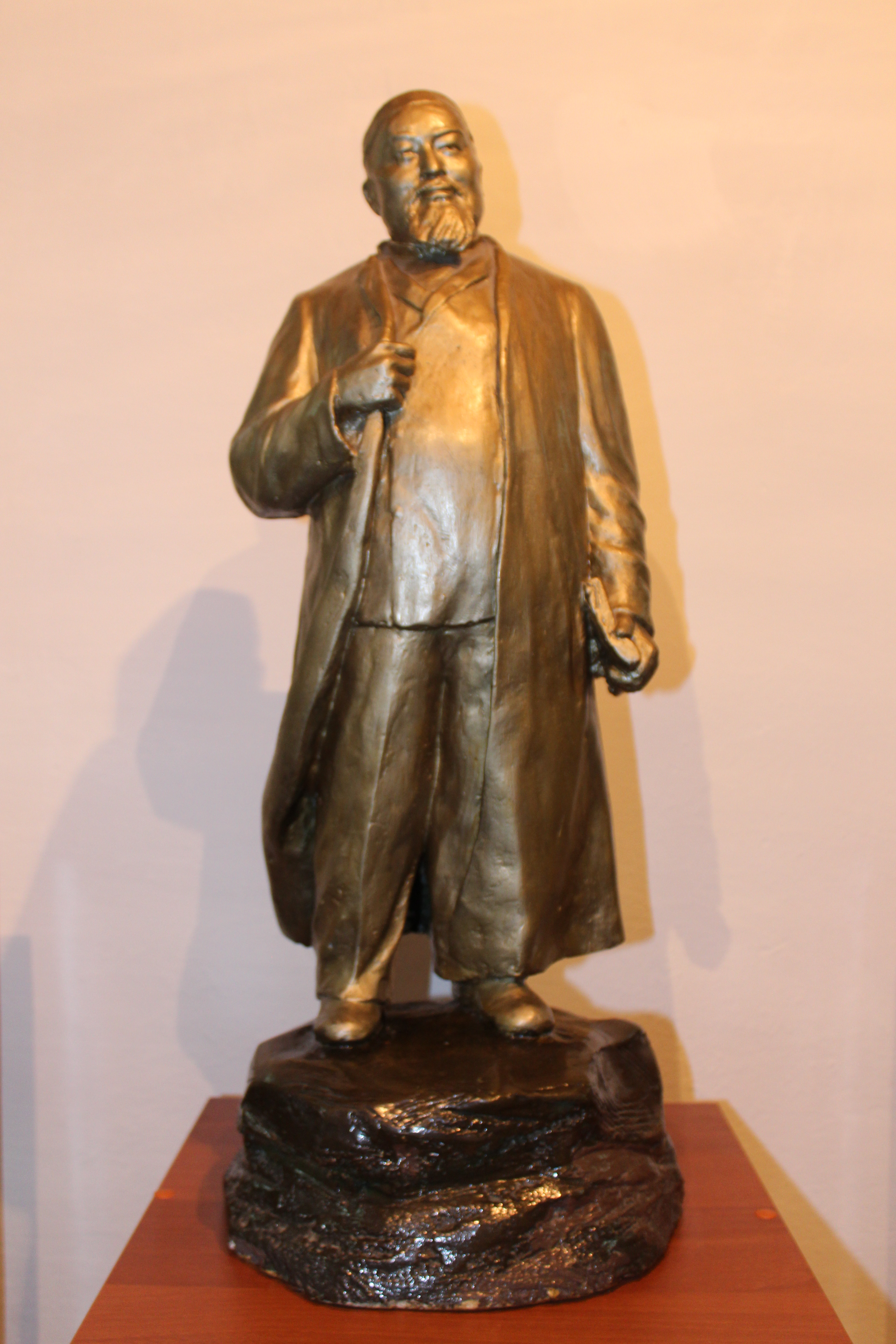 Қазақша (кирил): Абай мүсіні